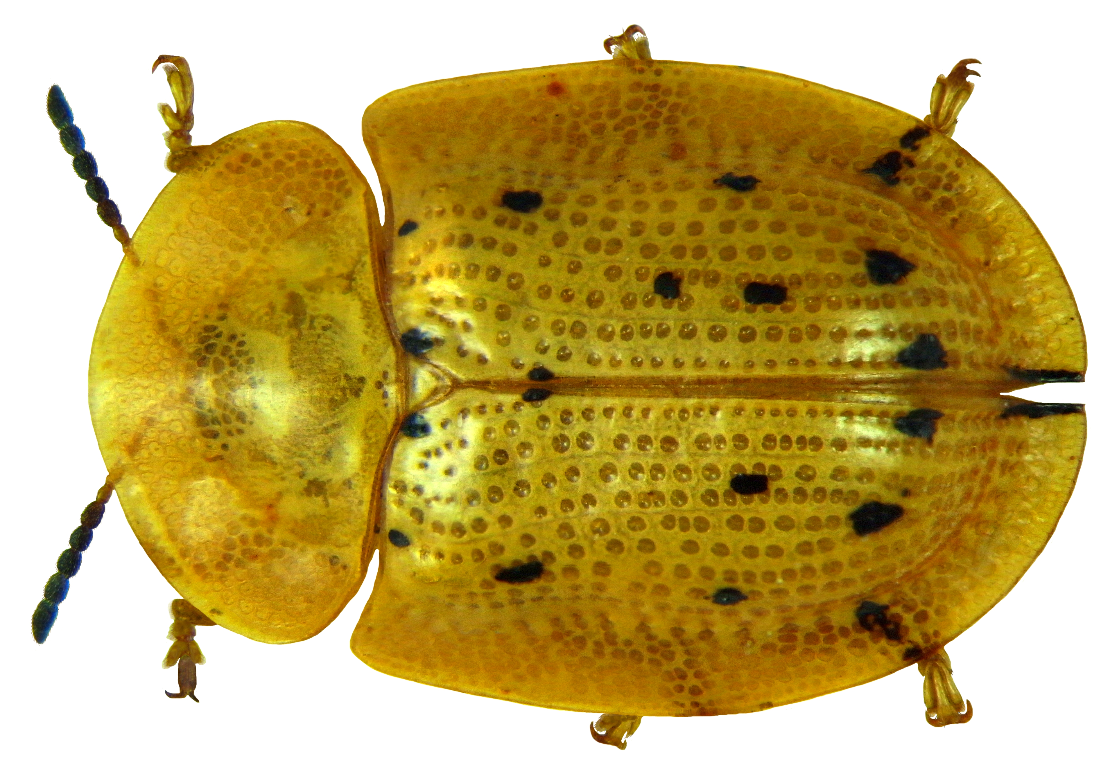 Aspidimorpha nigromaculata (Herbst, 1799) Familie: Chrysomelidae Groesse: 7,5 mm Fundort: Kenia, Tsavo National Park, Ngulia Lodge, 800 m leg. U.Schmidt, 27.XI.1991; det. L.Borowiec, 2012 Photo: U.Schmidt, 2012